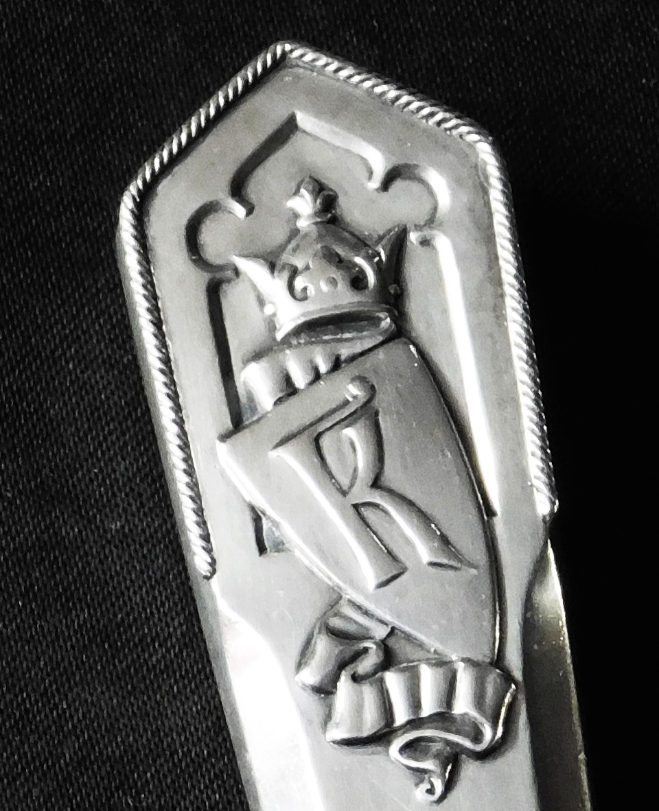 Tarcza z koroną i literą K zdobiąca części zastawy Kelchów wykonanej przez Faberge.